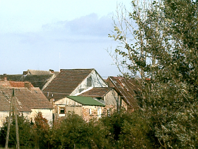 Pęplino